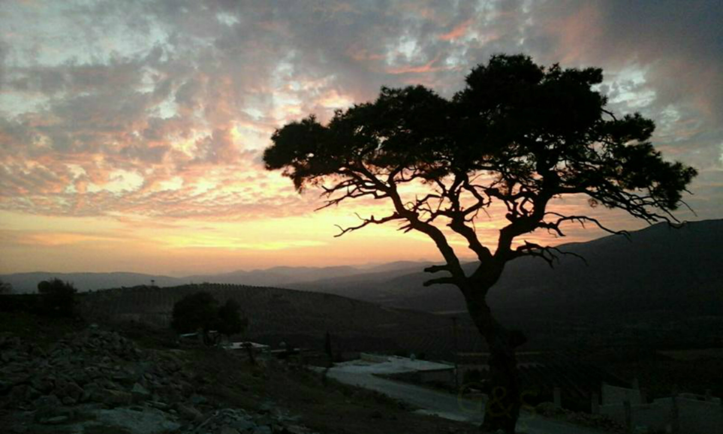 gûndi şorbe- afrin - شوربة أوغلي - عفرين